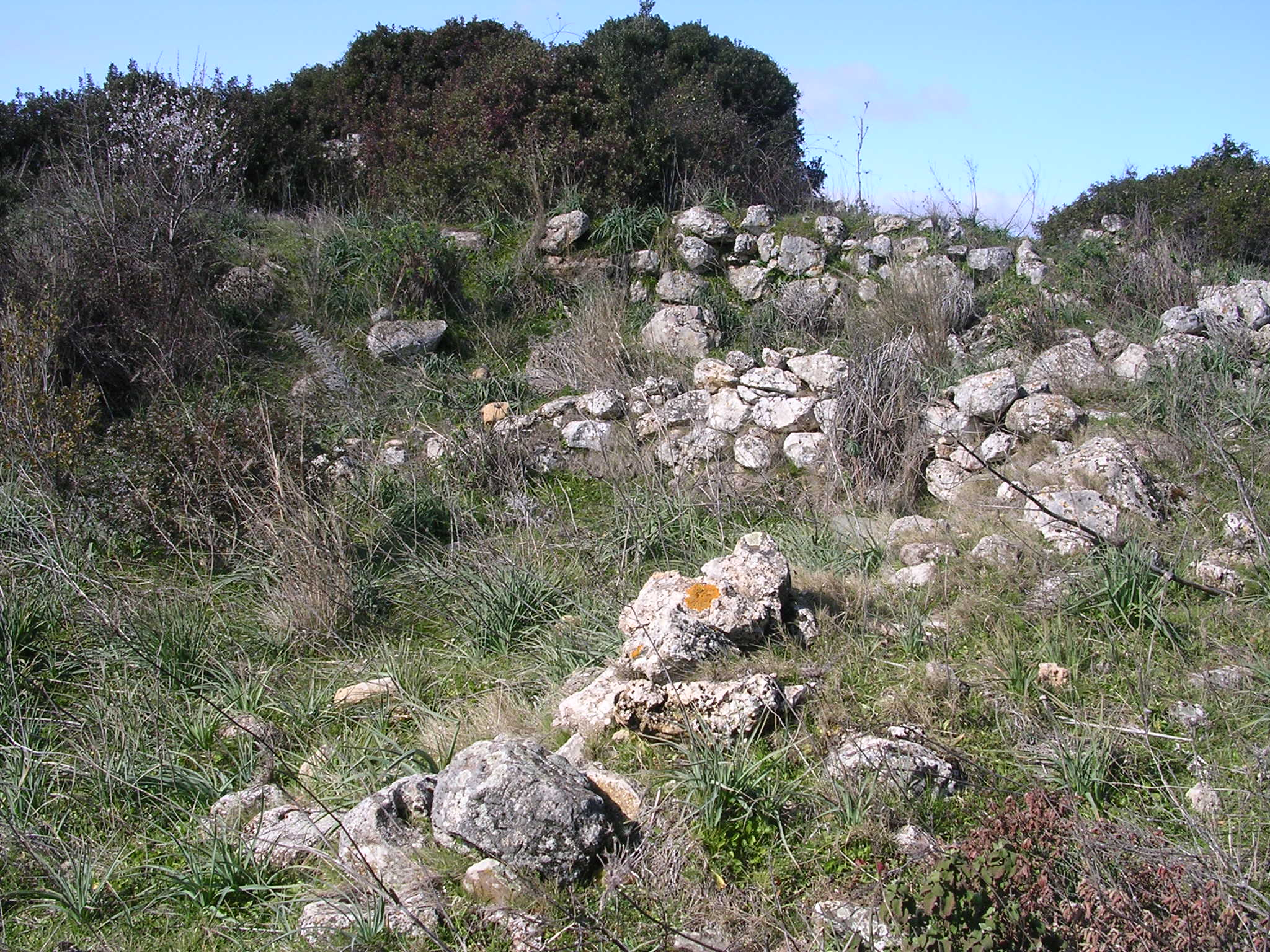 Resti del villaggio nuragico di Nuragheddu, nei pressi di Nuraghe Pranu a Ulassai